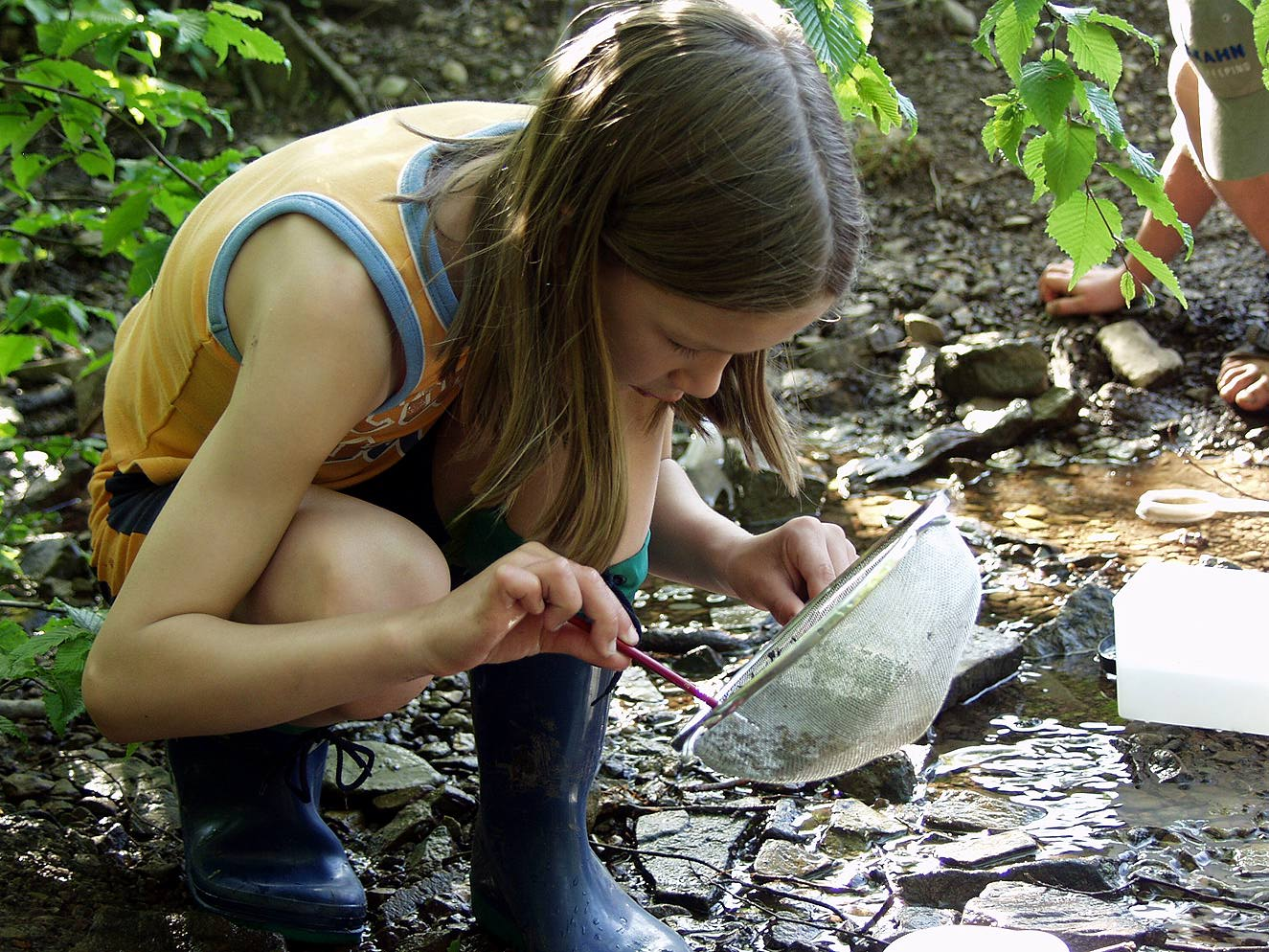 Kind untersucht voll konzentriert Bachlebewesen im Rahmen einer Natur-Exkursion